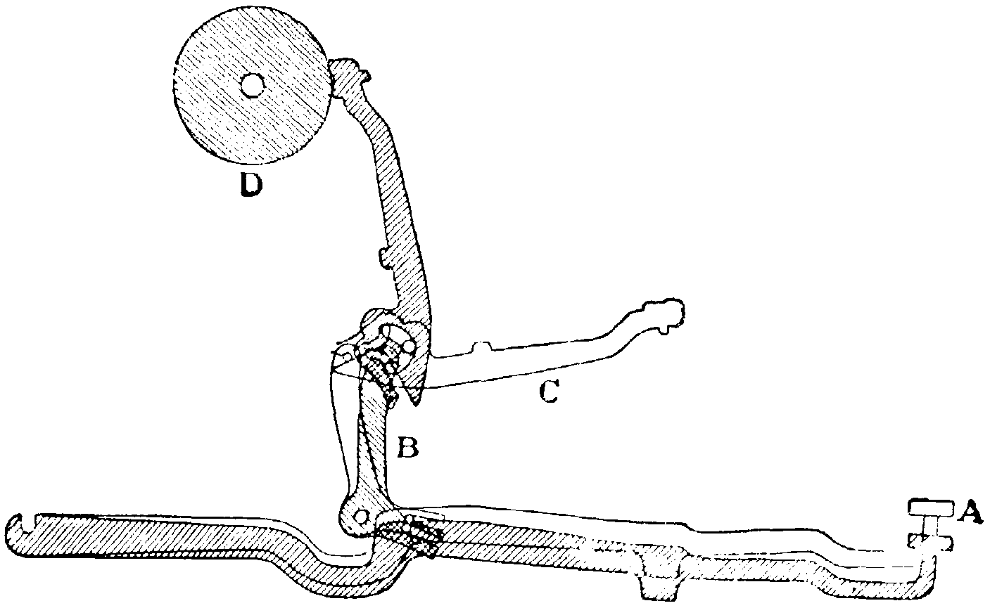 Skrifmaskin, fig 1